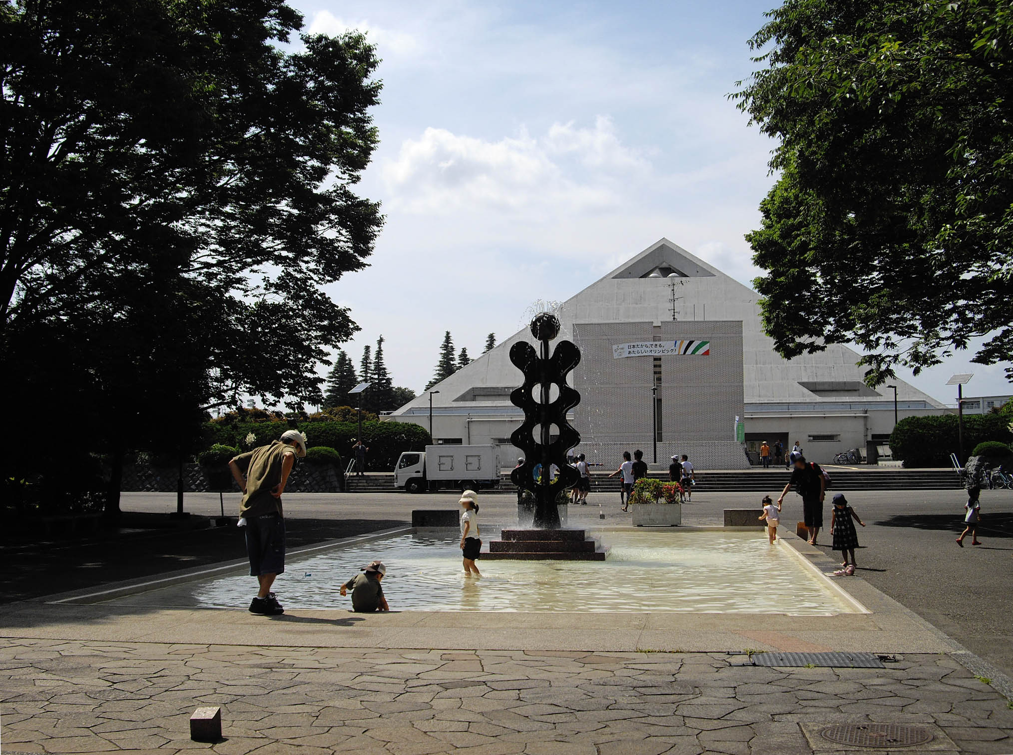 世田谷区立大蔵運動公園